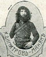 Портрет на К.Димитров.